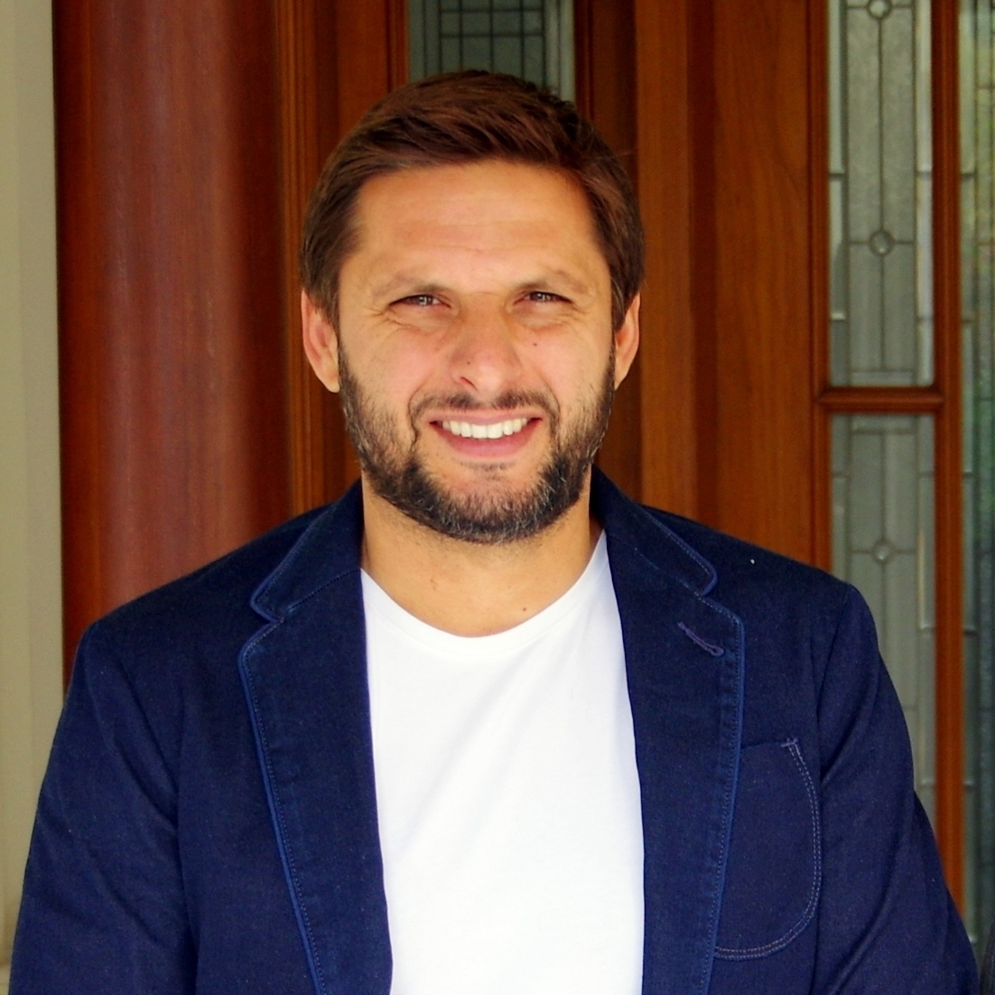 Shahid Afridi